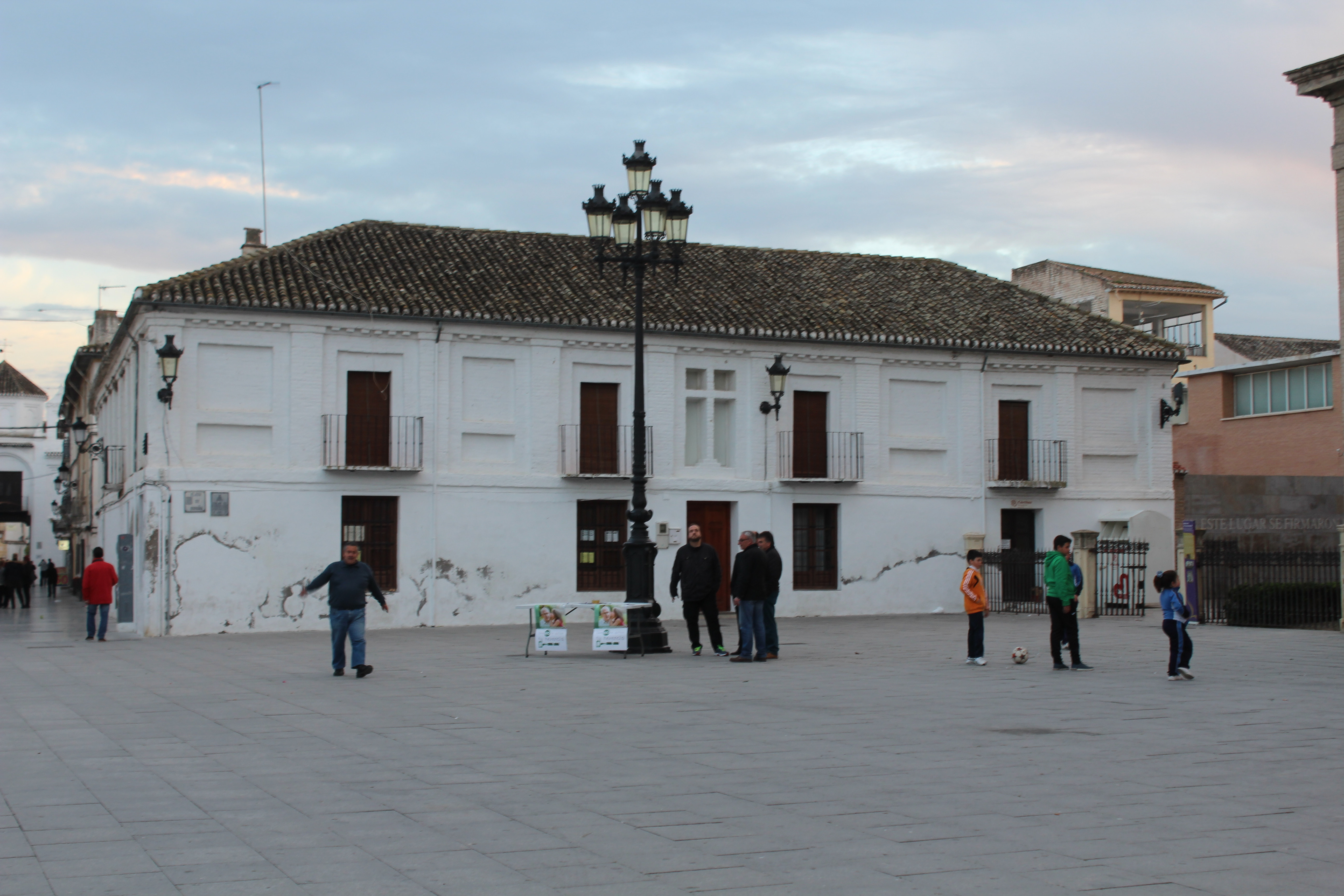 Antiguo Hospital Real de Santa Fe (Granada).